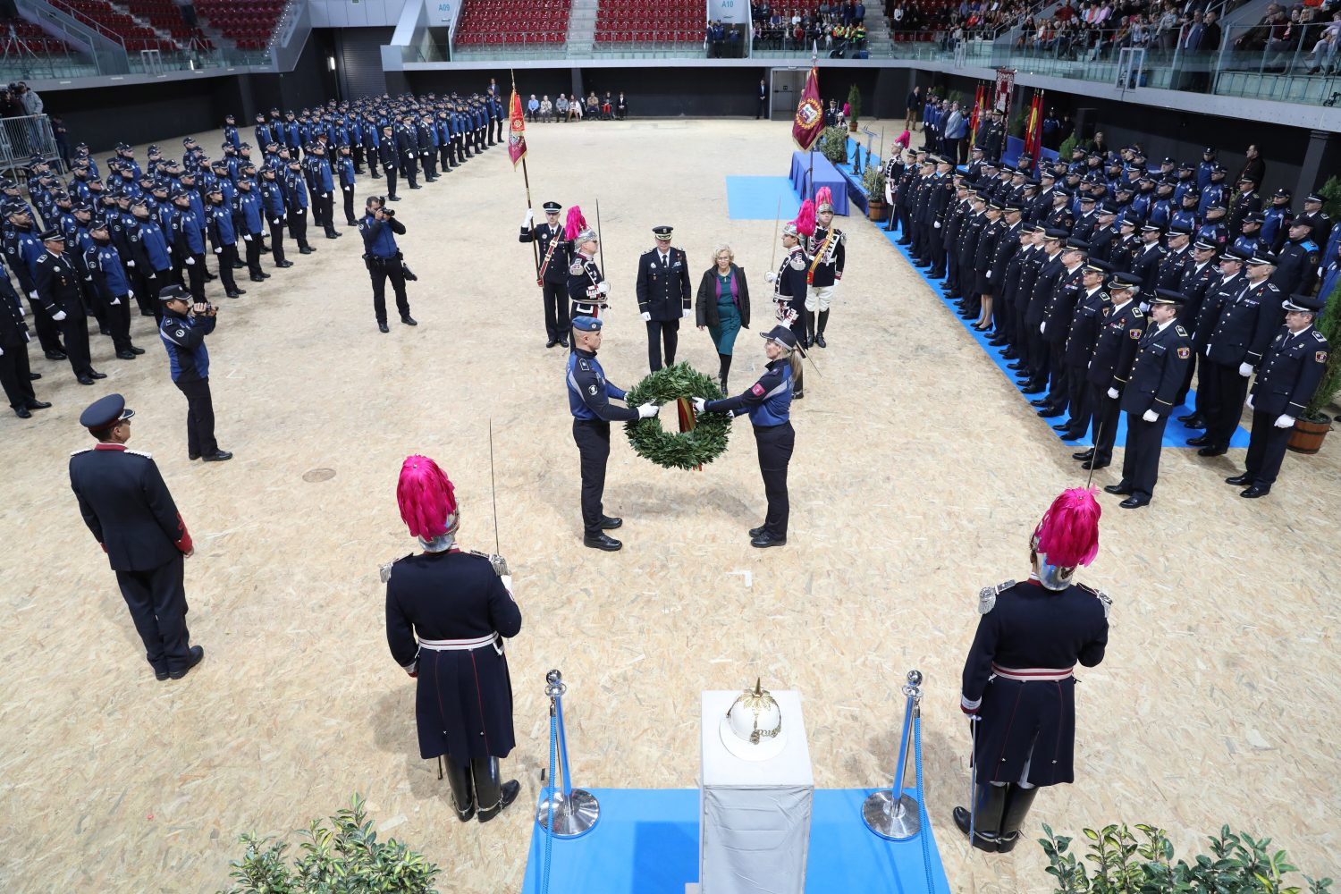 Manuela Carmena y Javier Barbero reciben a la nueva promoción de Policía Municipal Son un total de 116 hombres y 21 mujeres, pertenecientes a la 49ª promoción Tras la entrega de nombramientos se ha celebrado un homenaje a los compañeros caídos en acto de servicio. 15/11/2018 La alcaldesa de Madrid, Manuela Carmena, y el delegado del Área de Salud, Seguridad y Emergencias, Javier Barbero, han dado la bienvenida este mediodía a las y los agentes de la promoción número 49 del cuerpo de Policía Municipal. Se trata de 116 hombres y 21 mujeres que han superado el proceso selectivo, tanto de la oposición como del posterior periodo académico y que han recibido su nombramiento y han realizado el acatamiento a la Constitución.